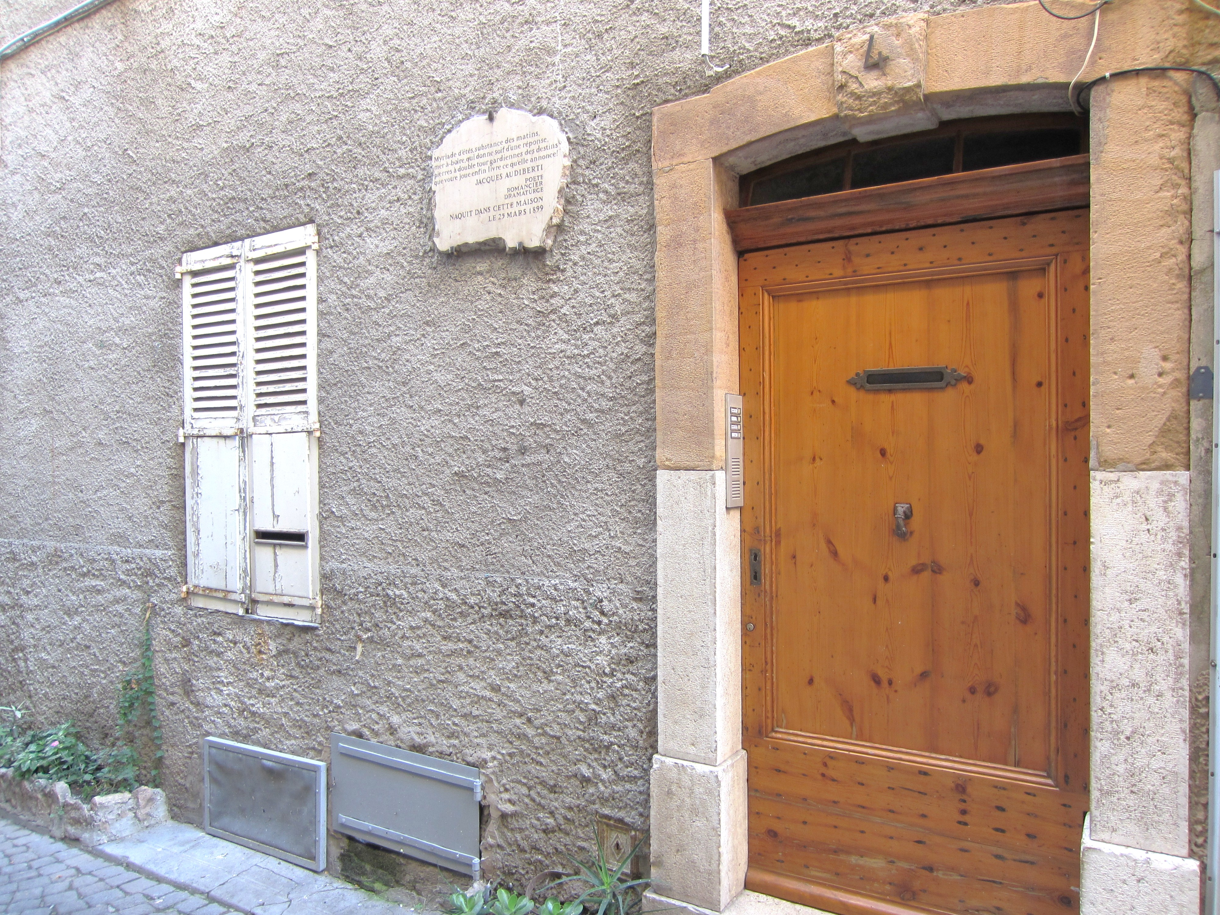 Description maison naissance audiberti Antibes Date22 October 2011Sourcemon appareil photoAuthorAimelaimePermission(Reusing this file) maison naissance audiberti Antibes